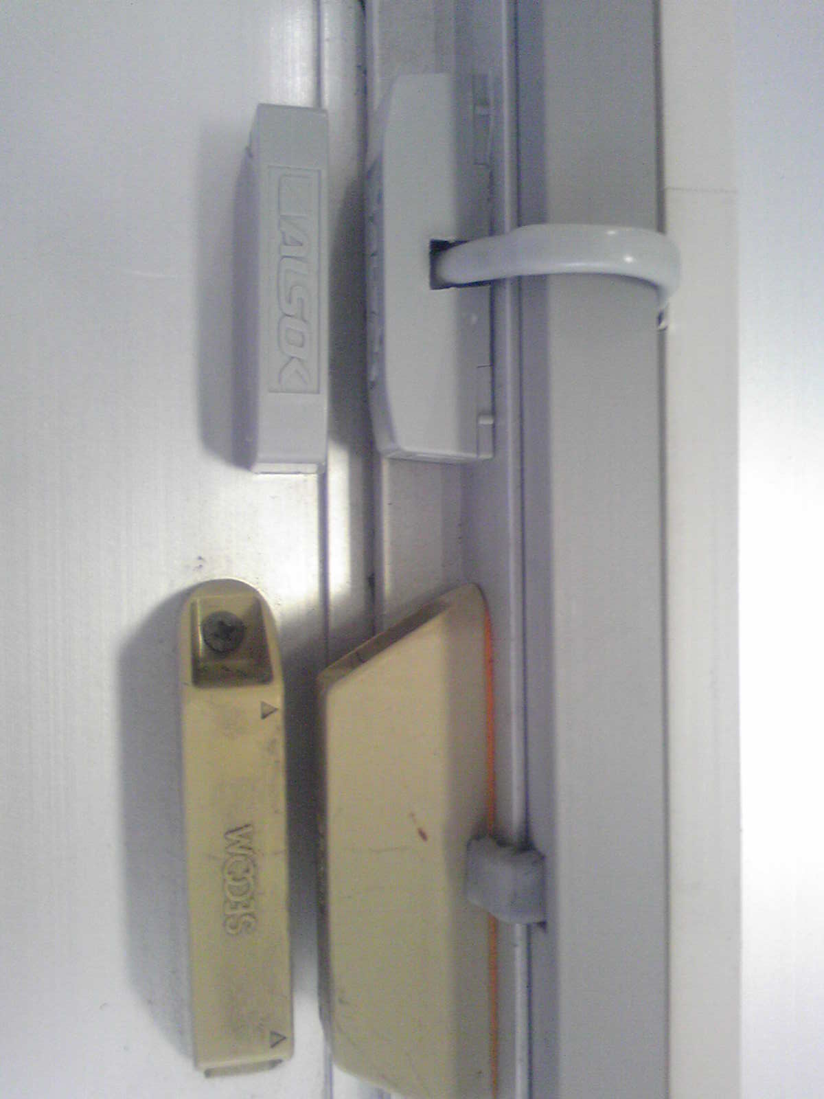 Öffnungs- und Schließsensor ALSOK und SECOM (Magnettyp)